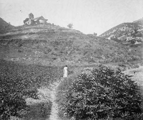 Imatge